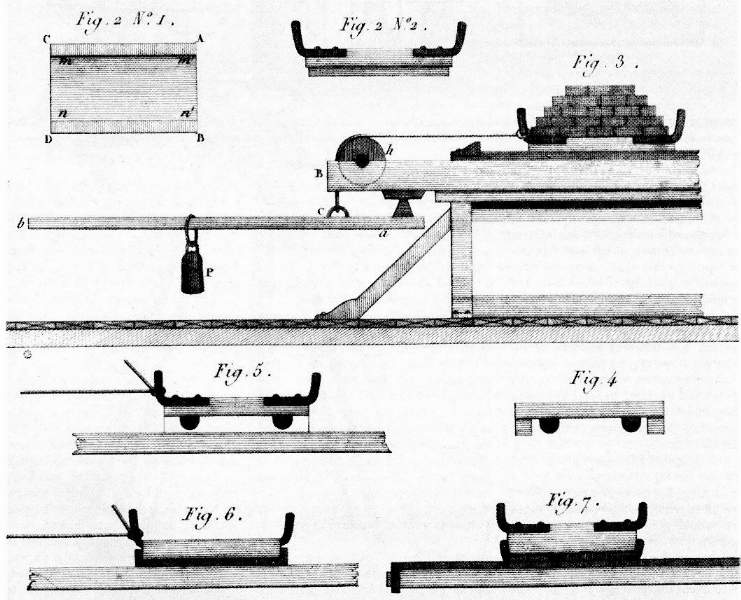 Appareil de Coulomb pour le frottement